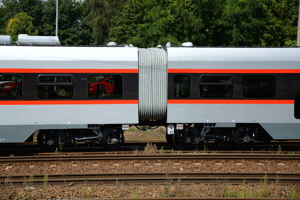 Przegub międzyczłonowy w Pesie 730ML-005